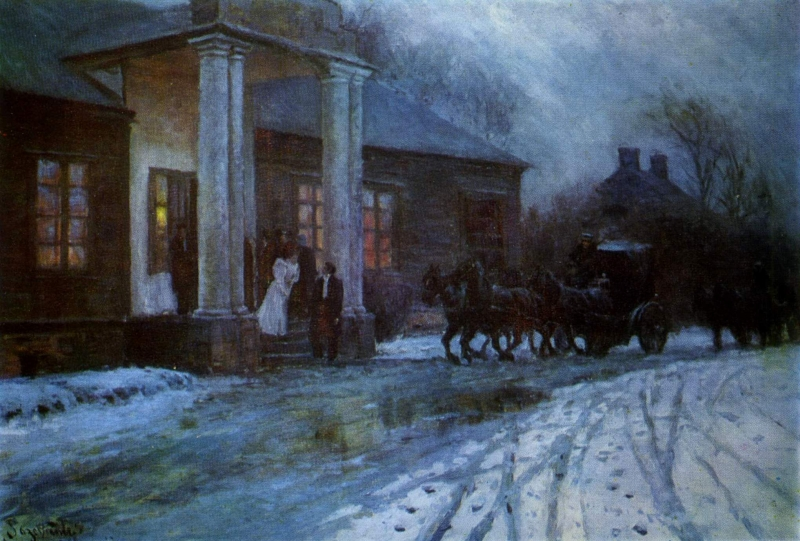 Беларуская (тарашкевіца): Старая Воля (Staraja Vola), сядзіба Жукоўскіх (Žukoŭski). Карціна «Разьезд. Сьвітанак»